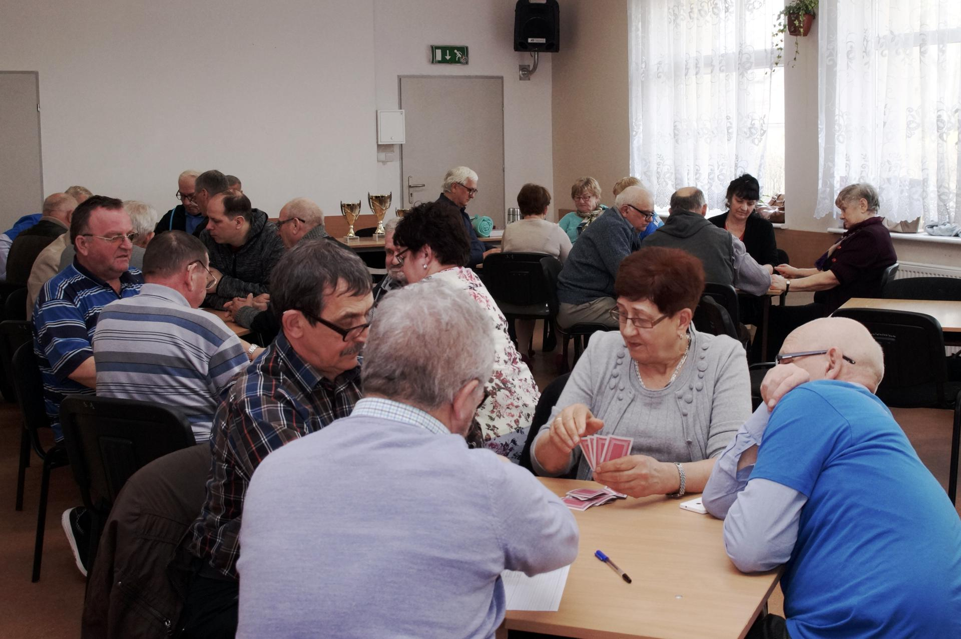 Turniej gier karcianych (Wojcieszyce, kwiecień 2018 r.)